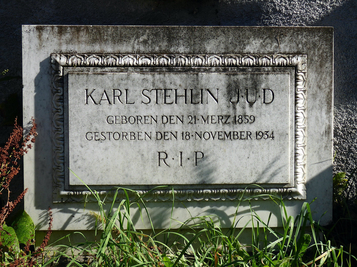 Karl Friedrich Stehlin (1859-1934) Jurist, Archäologe, Historiker, Politiker. Grab auf dem alten Friedhof von Arlesheim, Basel-Land